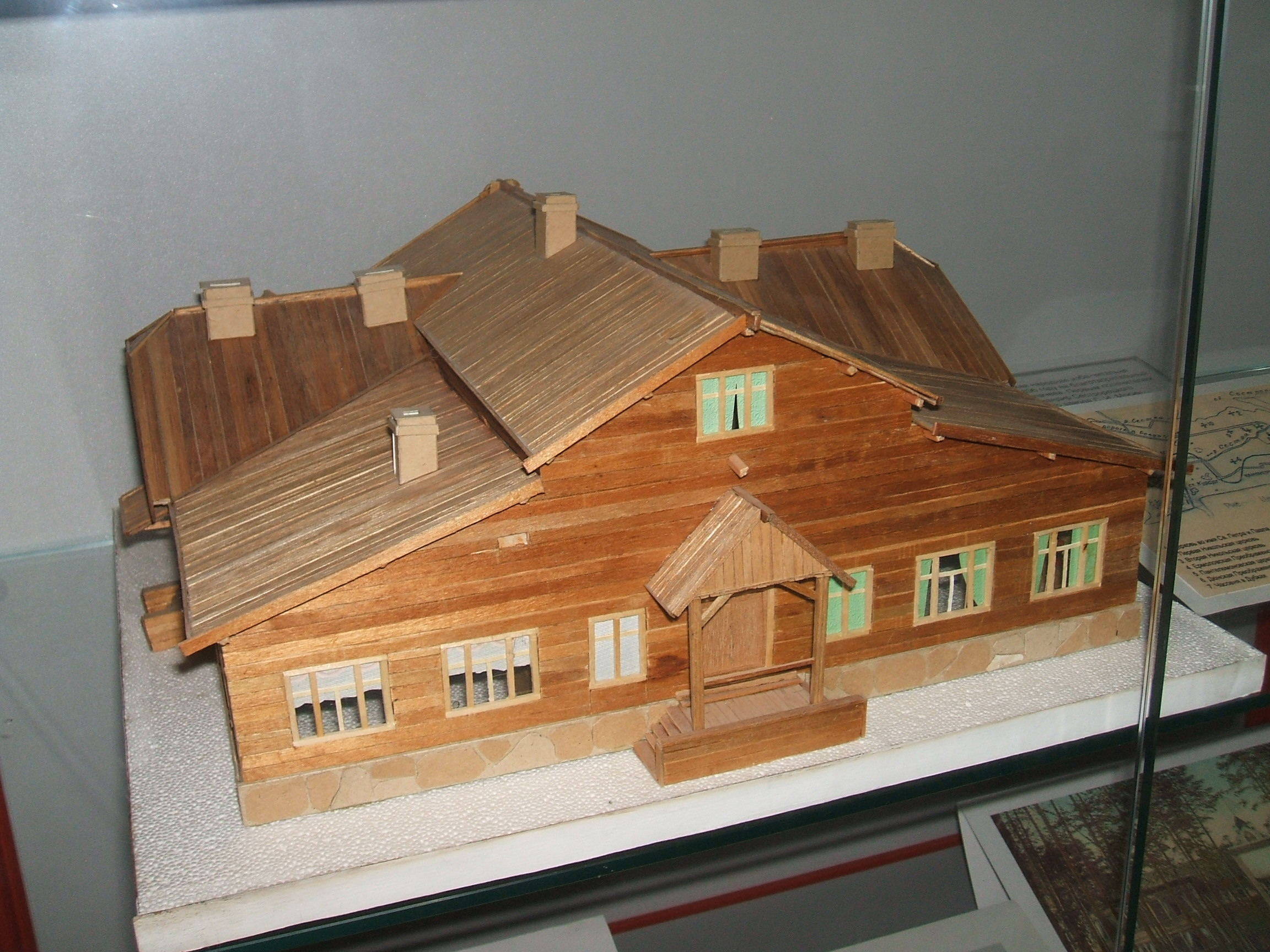 фото макета избы читальни построенной в Сестрорецке СПб в конце 19 века